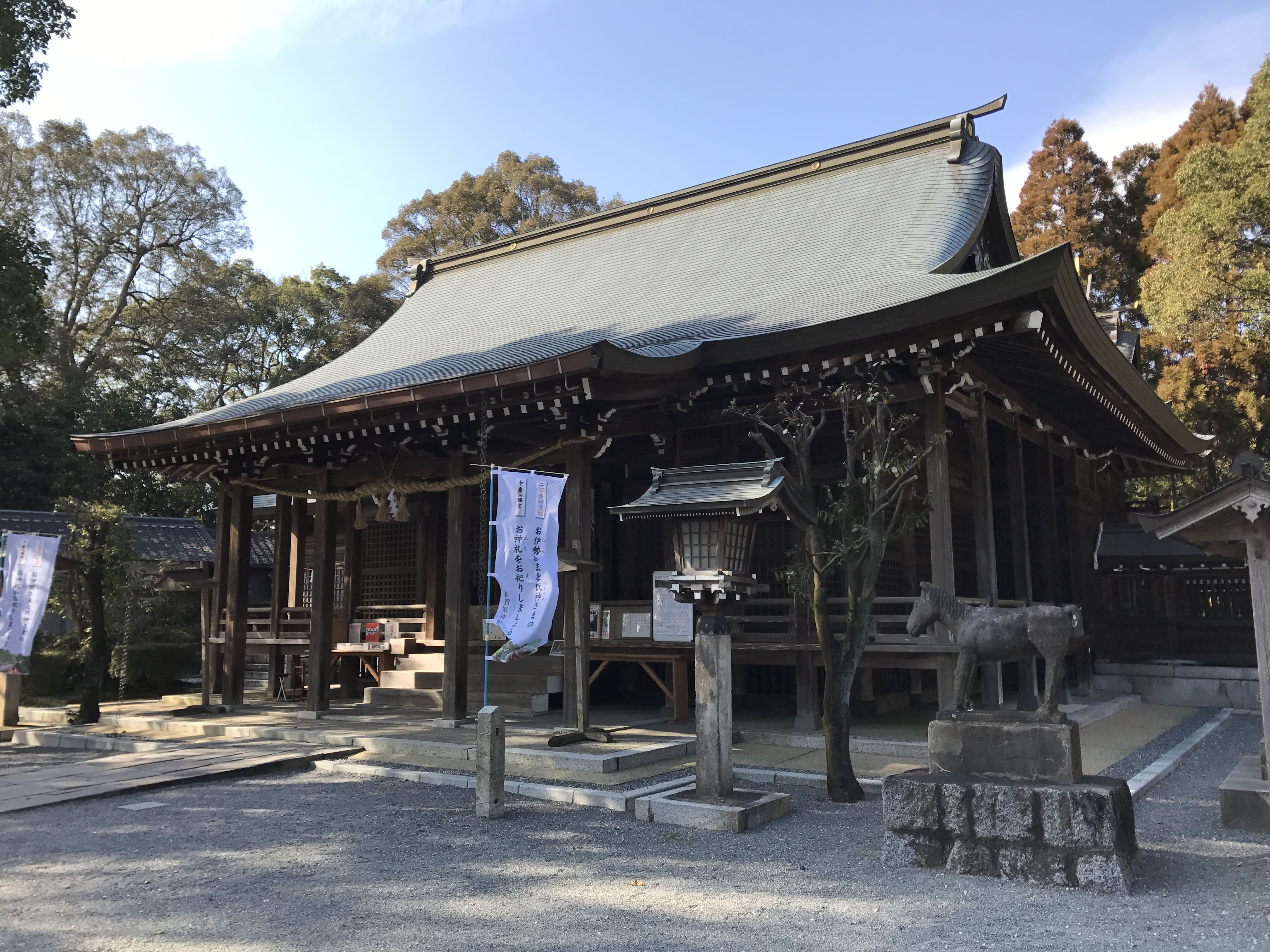 千栗八幡宮の拝殿